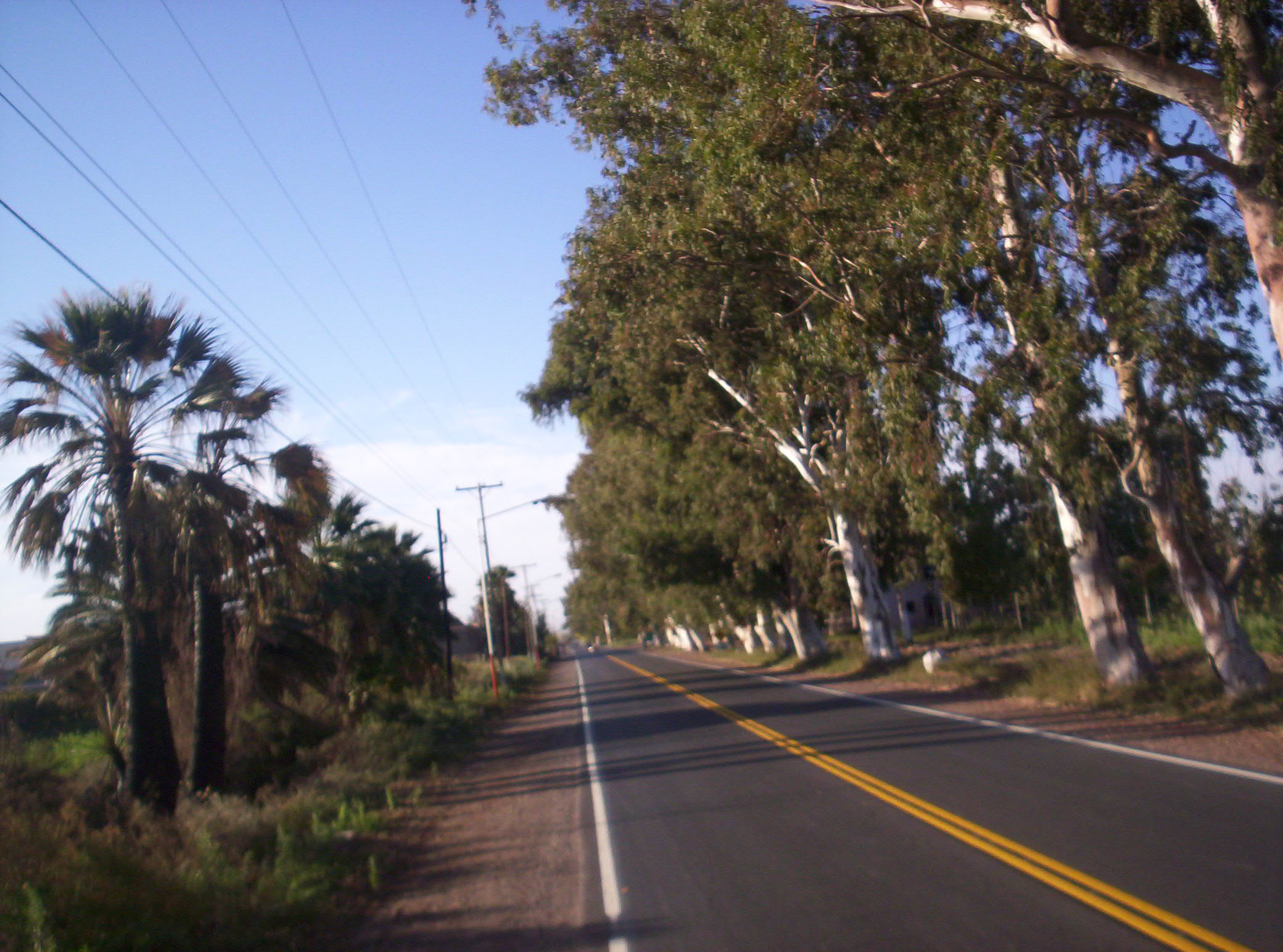 Vista de la denominada calle Nacional en el distrito de Dos Acequias, departamento San Martín, provincia de San Juan, Argentina